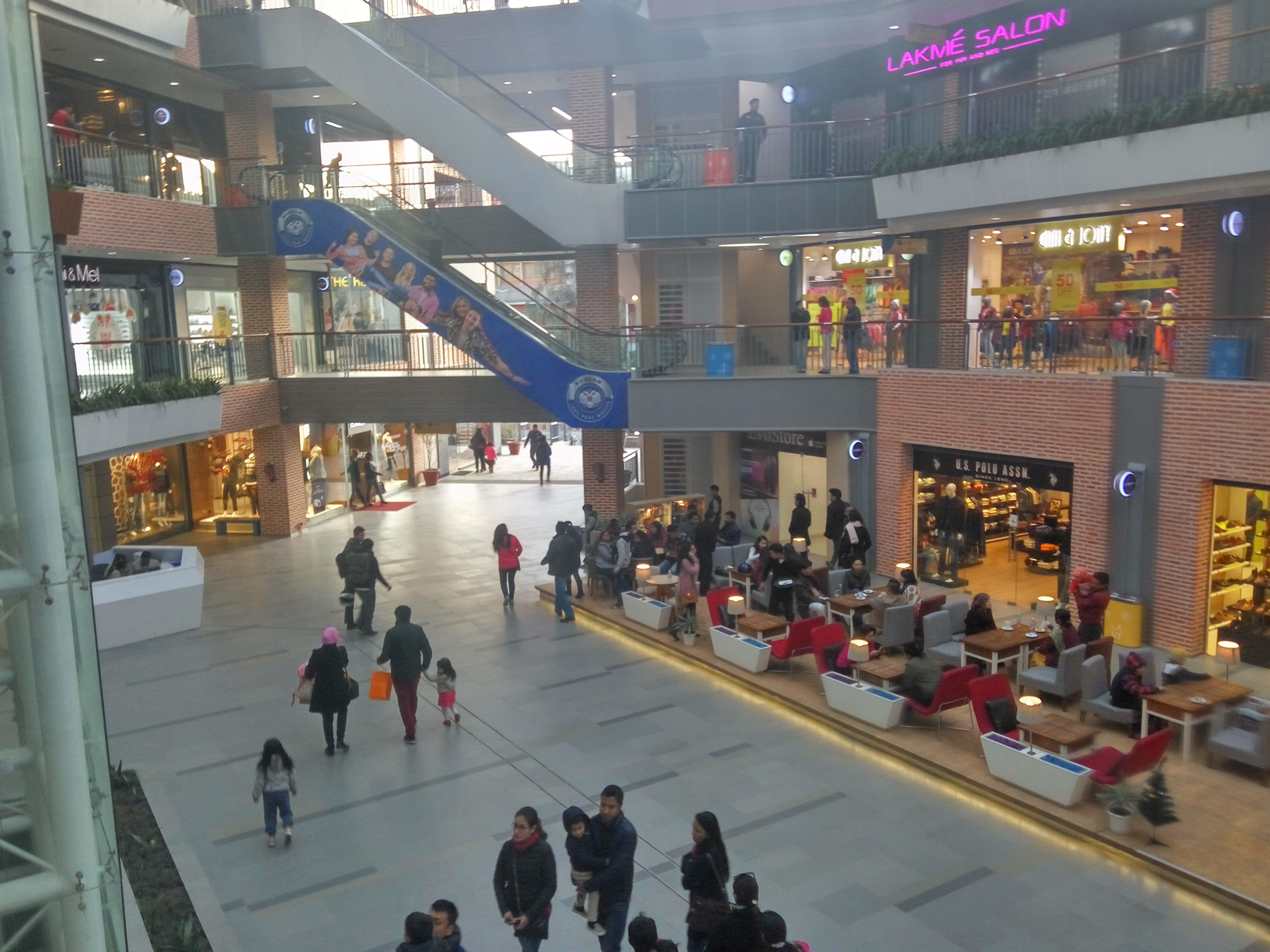 labim mall in lalitpur